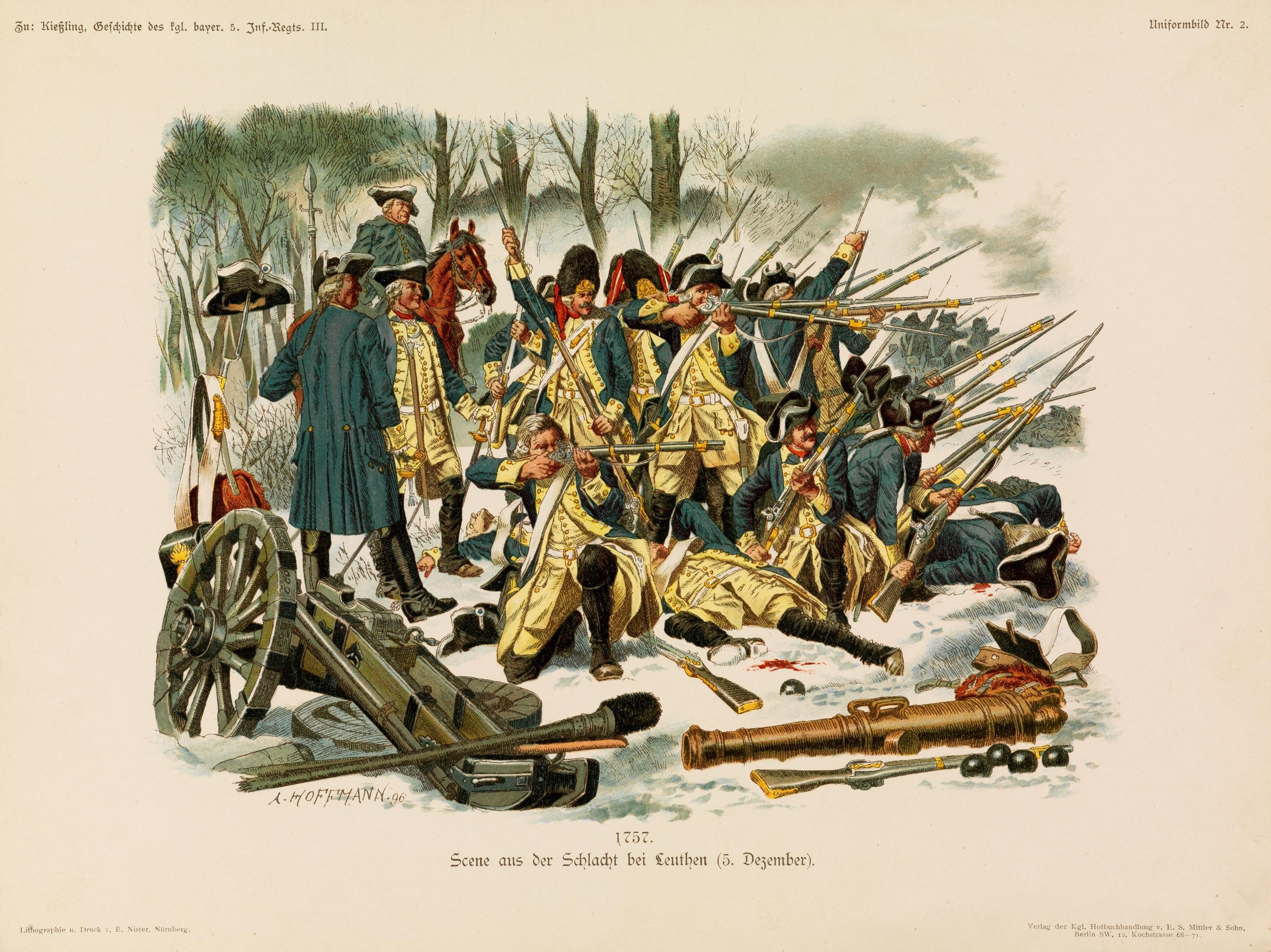 Uniform-Bilder zur Geschichte des Königl. Bayer. 5. Infanterie-Regiements Grossherzog Ernst Ludwig von Hessen. Lithographie und Druck v. E. Nister, Nürnberg. Verlag der Kgl. Hofbuchhandlung v. E. S. Mittler & Sohn, Berlin.